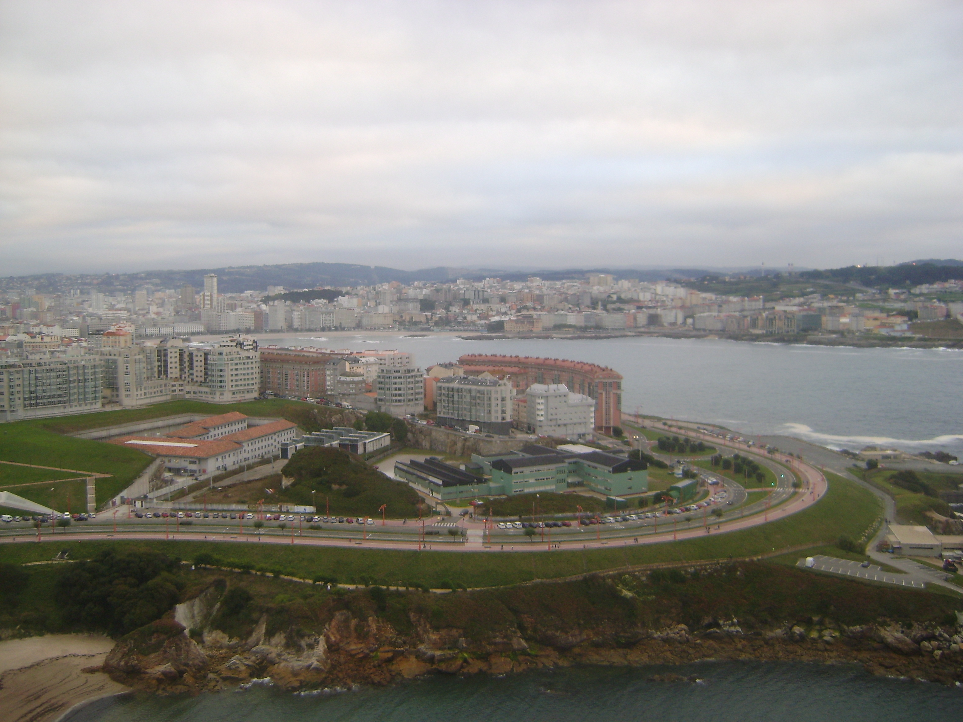 Imagen de La Coruña.